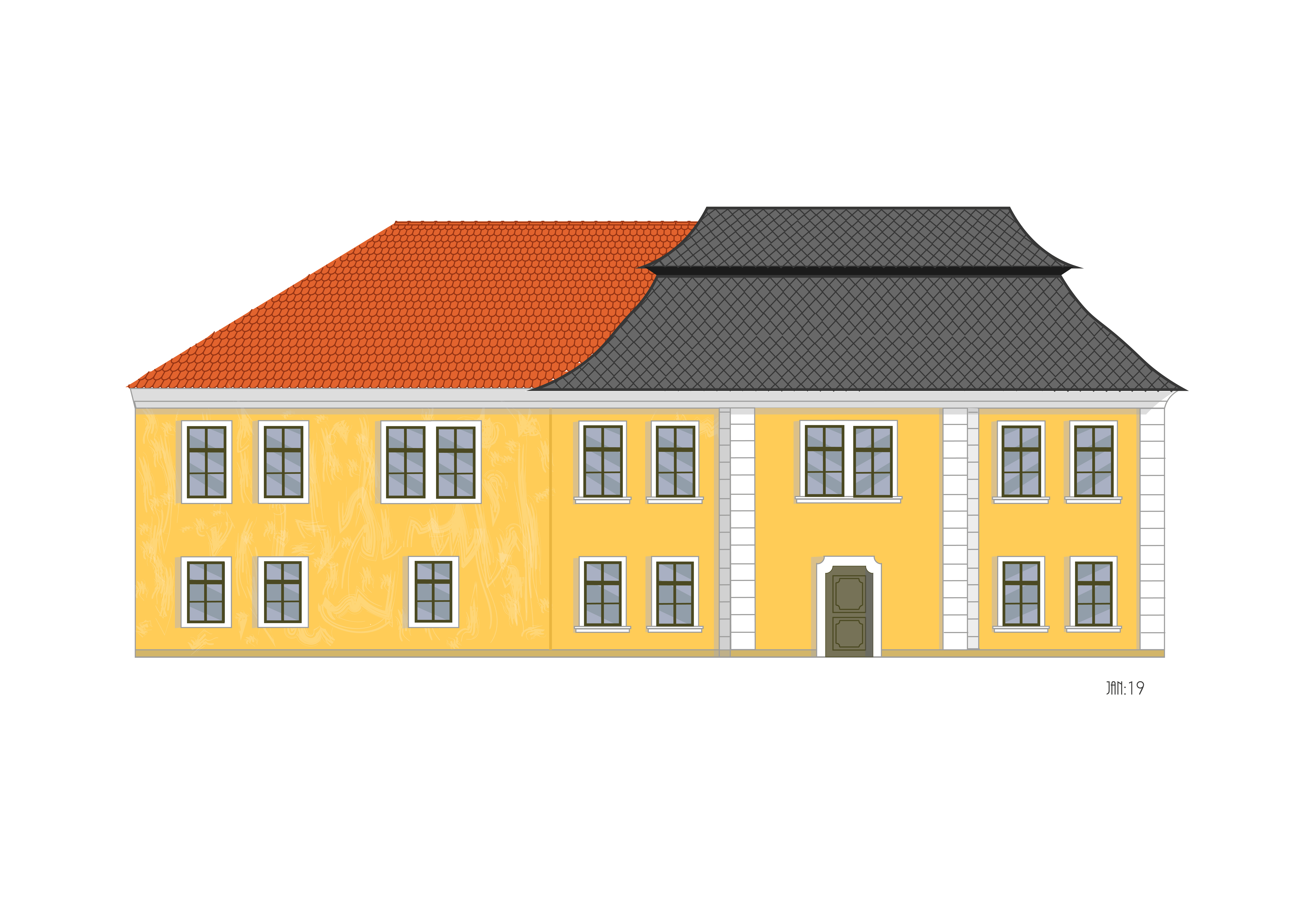 Bačkov